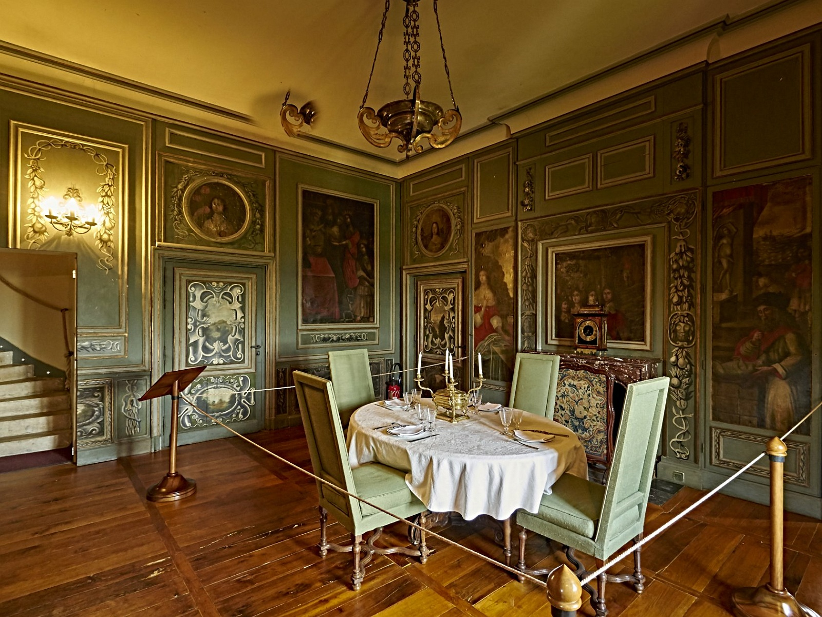 Château de Hautefort, salle à manger